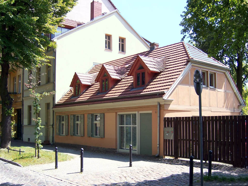 Foto von einem Weberhaus im Weberviertel von Potsdam-Babelsberg